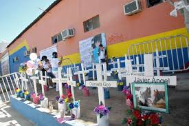 La Guardería ABC después de la tragedia.